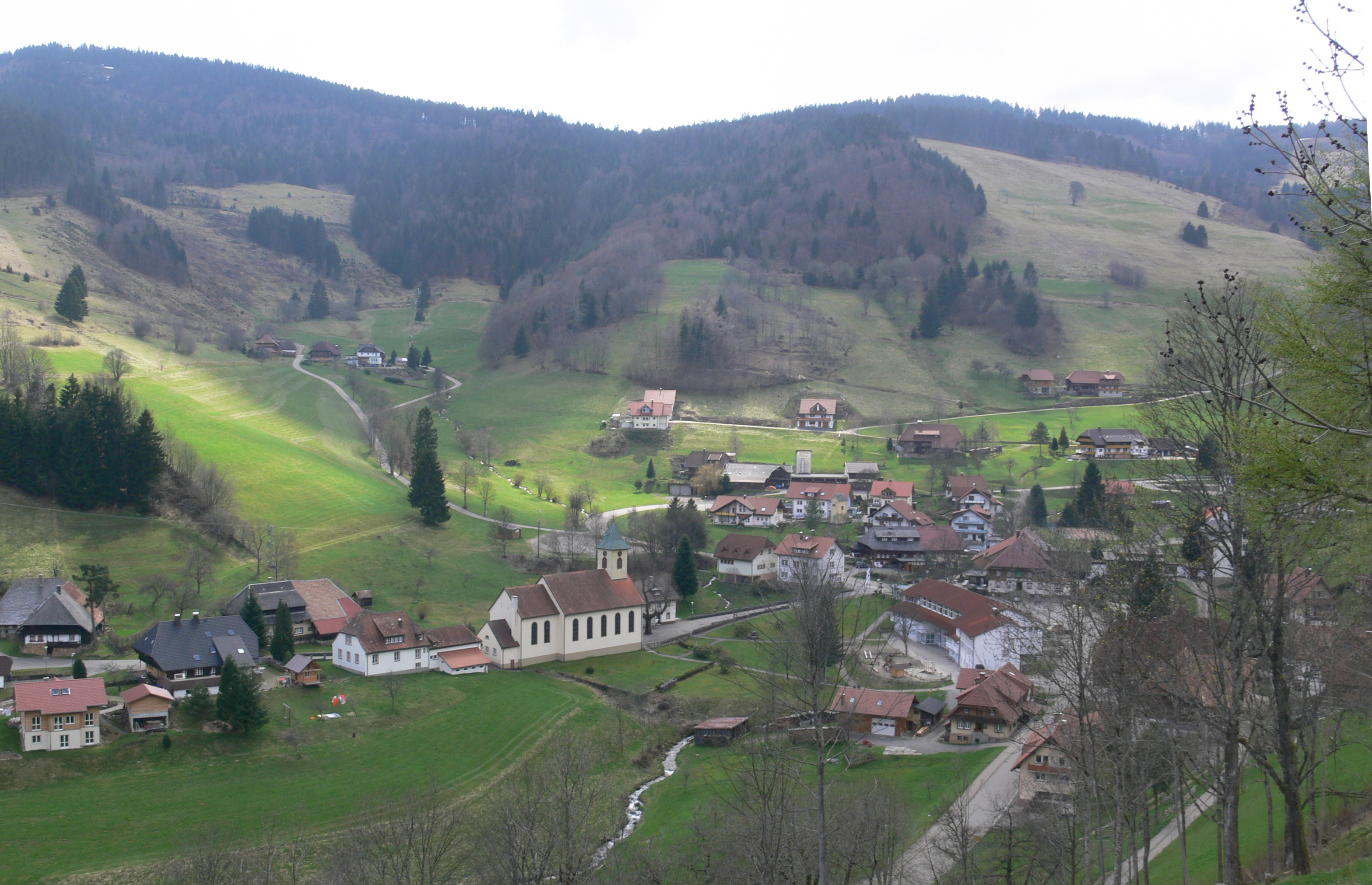 Wieden (Schwarzwald): Blick auf den Ortskern